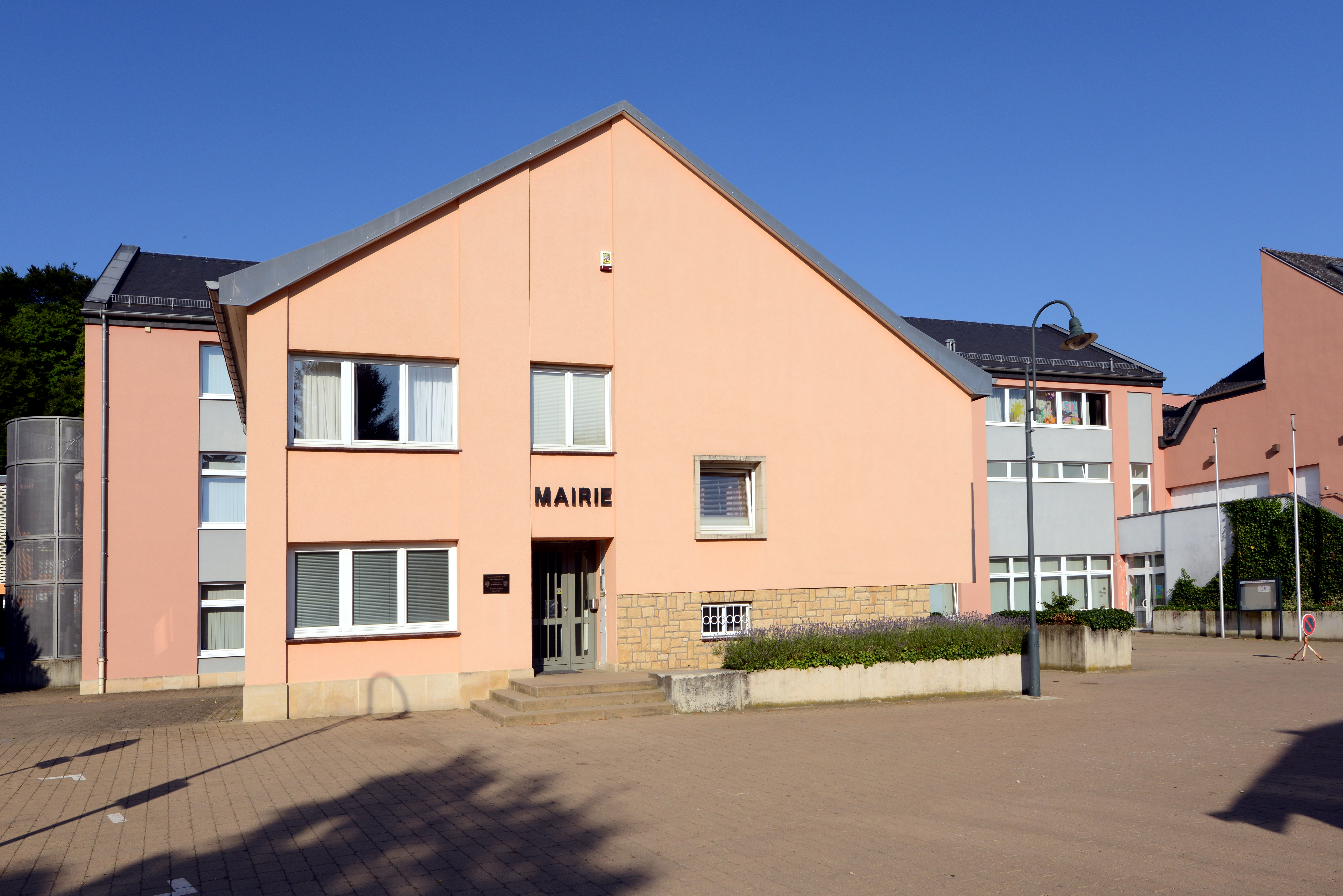 D'Märei vun der Gemeng Waldbriedemes zu Trënteng.